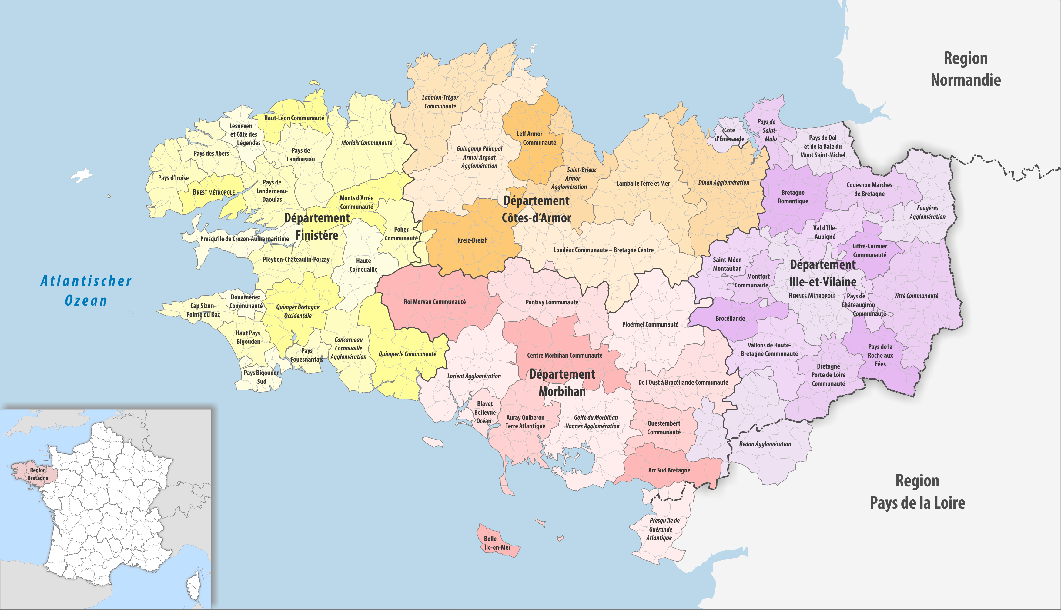 Gemeinden, Gemeindeverbände und Départemente in der Region Bretagne